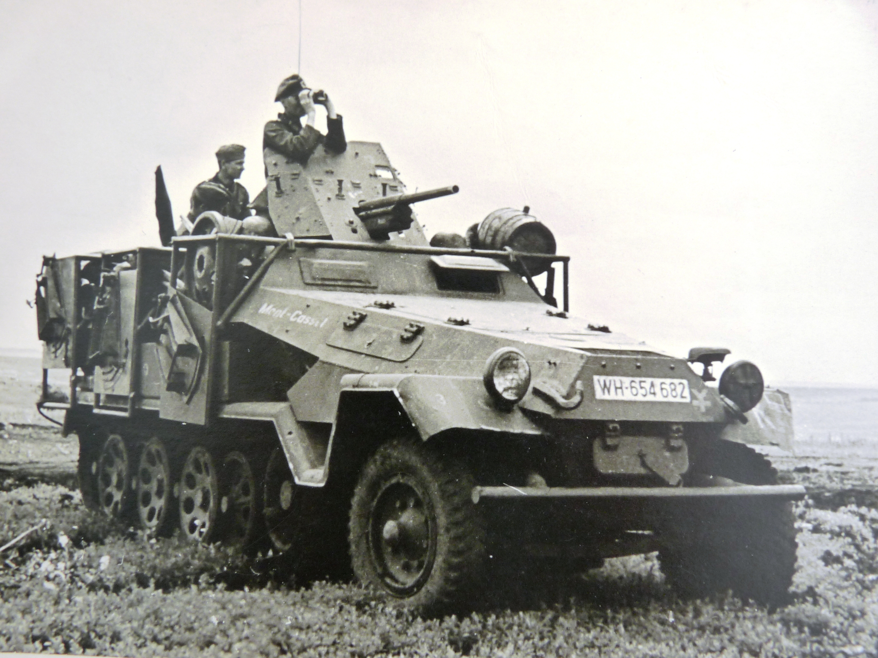 Zugführer Lt. Detmar Philippi SPW/Schützen Battalion 64 beim Vormarsch zum Don